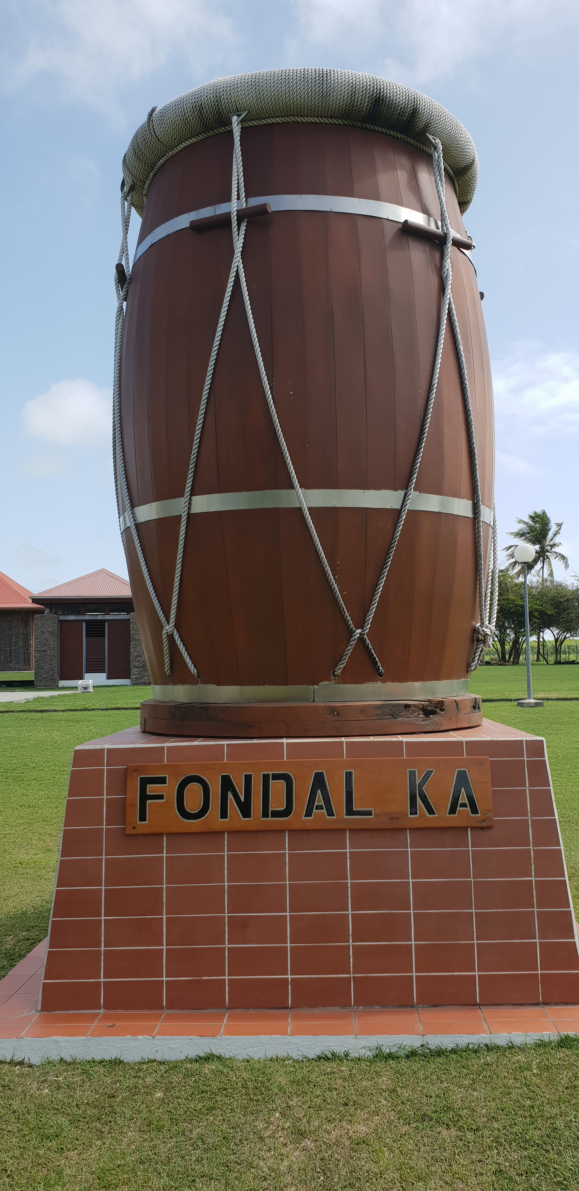 Situé sur le lieu même de l'ancienne usine, ce site de rencontres et d'expression s’étend sur 6 hectares. Outre une Pépinière d'entreprises, il accueille l'Espace international du ka et des tambours du sud où fut installé le Fondal Ka, un immense tanbou-ka symbole de cette musique et une “allée des tanbouyés“ où 12 totems représentent les maîtres ka parmi les plus illustres : Vélo, Kristen Aigle, Ti Téch, Gi Konket, Chaben, Sergius Geoffroy, Loyson, Aksidan, Ti Papa, Blanchinot, Kancel, Anzala, Ti Céleste. Diverses manifestations annuelles dont le festival des danses et musiques indiennes de la Caraïbe y sont organisées. Inscrit dans le parcours culturel de Petit-Canal, plusieurs nouvelles créations y sont prévues (Maison de l'indianité, salle de concert, espace documentaire etc.). Le Gwo Ka (du nom du quart de tonneau qui servait autrefois au transport des victuailles) est un genre musical créé par les esclaves en Guadeloupe au début du XVIIIè siècle. Musique mais aussi danse, culture, façon d'être et outil de communication des travailleurs dans les plantations, il puise ses racines dans les chants et percussions originaires des pays de la côte ouest d'Afrique. Cette musique se caractérise par l'improvisation, le rythme répétitif avec syncopes, l'accompagnement de danses, le jeu entre soliste et chœur. Le Gwo Ka participait à chaque temps fort de la vie quotidienne influençant différents types de chants. Cette pratique généra sept rythmes : le Léwòz, le Menndé, le Kaladjya, le Graj, le Woulé, le Padjanbèl et le Toumblak. Les tambours utilisés (appelés du même nom gwo ka) sont de différentes tailles. Le boula, le plus grand, marque le rythme central, le marqueur interprète la mélodie en complicité avec danseurs, chanteur et chœurs. Le gwoka est toujours présent durant le carnaval, dans nombreuses manifestations festives, lors de rassemblements populaires (léwoz), et fréquemment dans les veillées mortuaires.